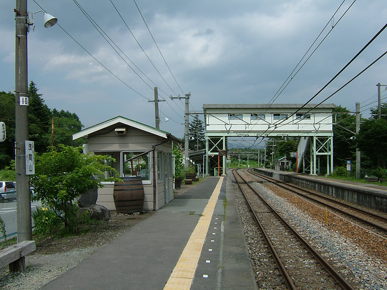 しなの鉄道線（旧・信越本線）信濃追分駅上りホーム